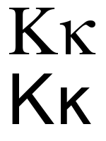 greek letter kappa